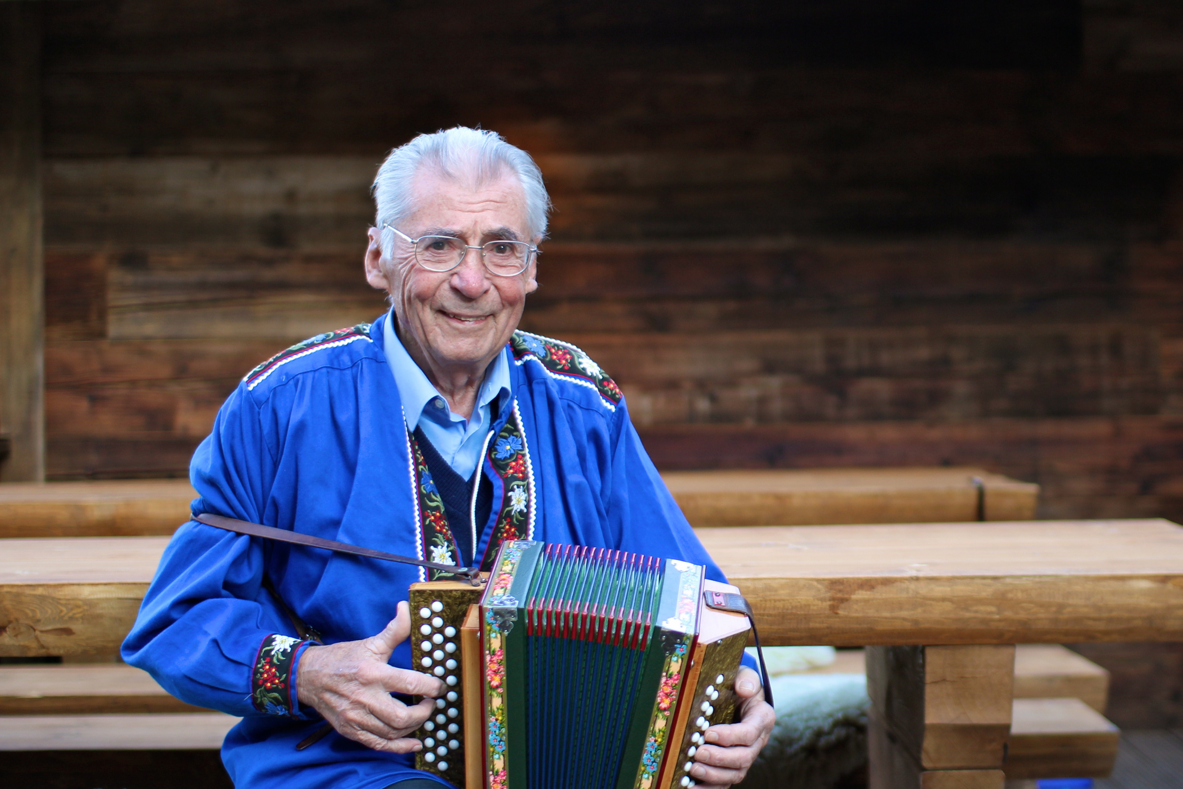 Der Bündner Volksmusiker Hitsch Jenny am Schwyzerörgeli.